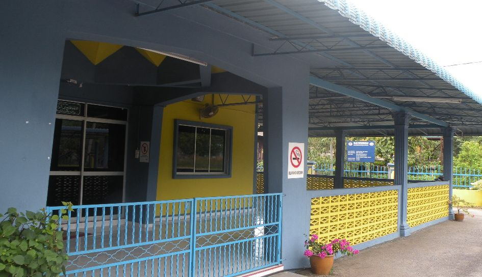 Pandangan sisi depan Masjid